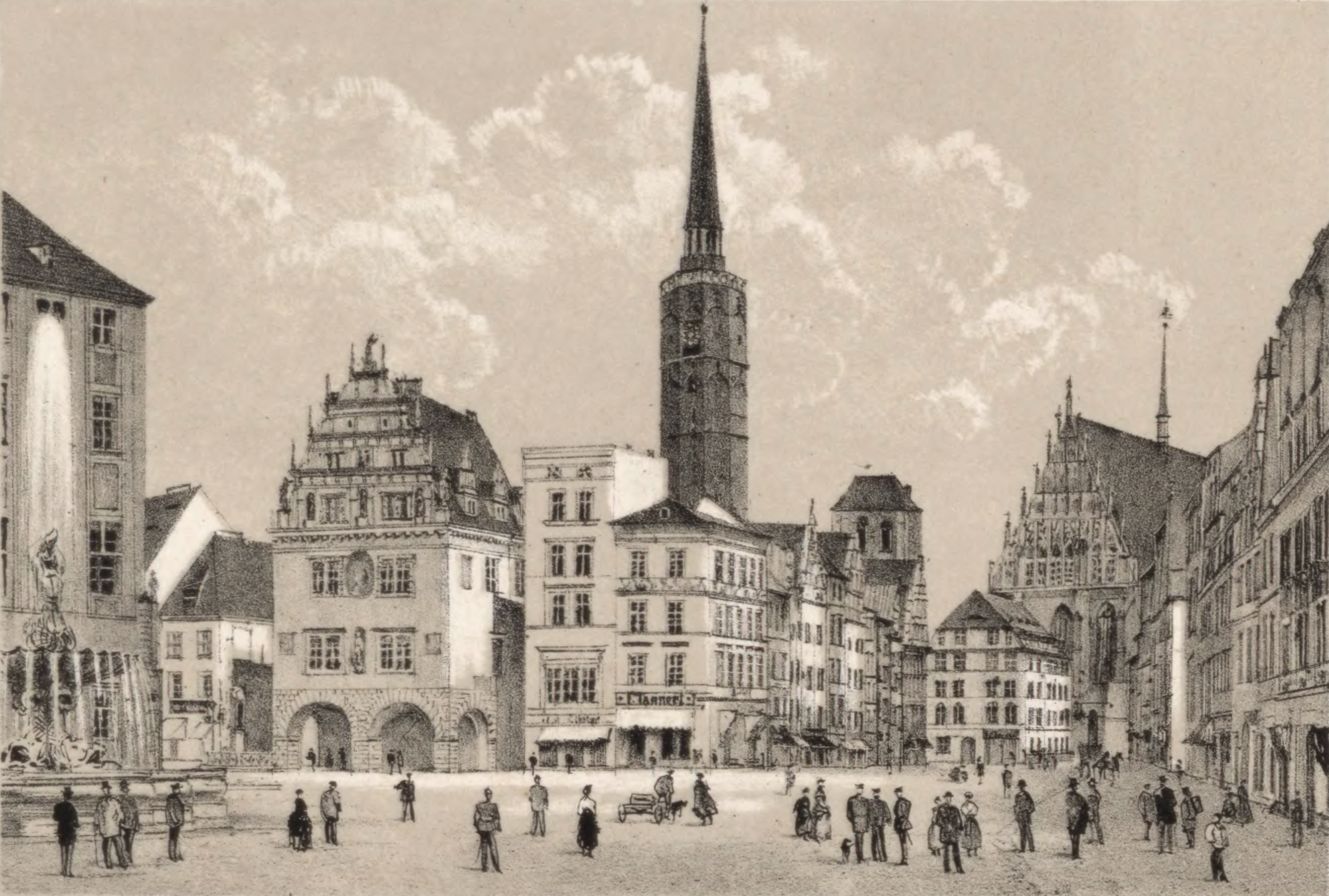 Der Ring in Neisse auf einer Lithografie aus dem 19. Jahrhundert von Robert Geissler. Zu sehen sind u.a. der Rathausturm und die Waage.